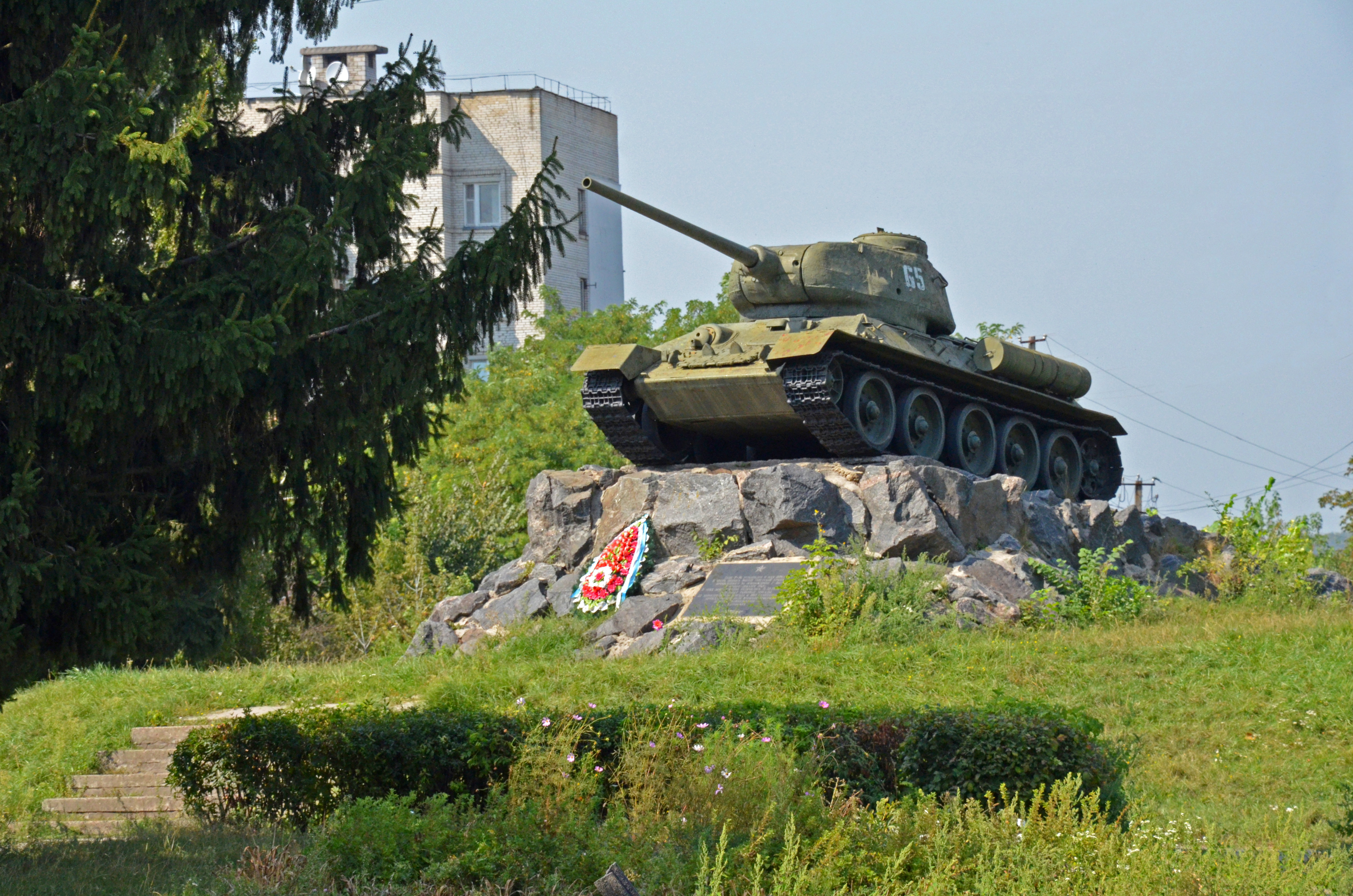 Пам'ятник (танк Т-34) радянським воїнам-танкістам, визволителям міста від окупантів, Фастів, пл. Героїв-танкістів